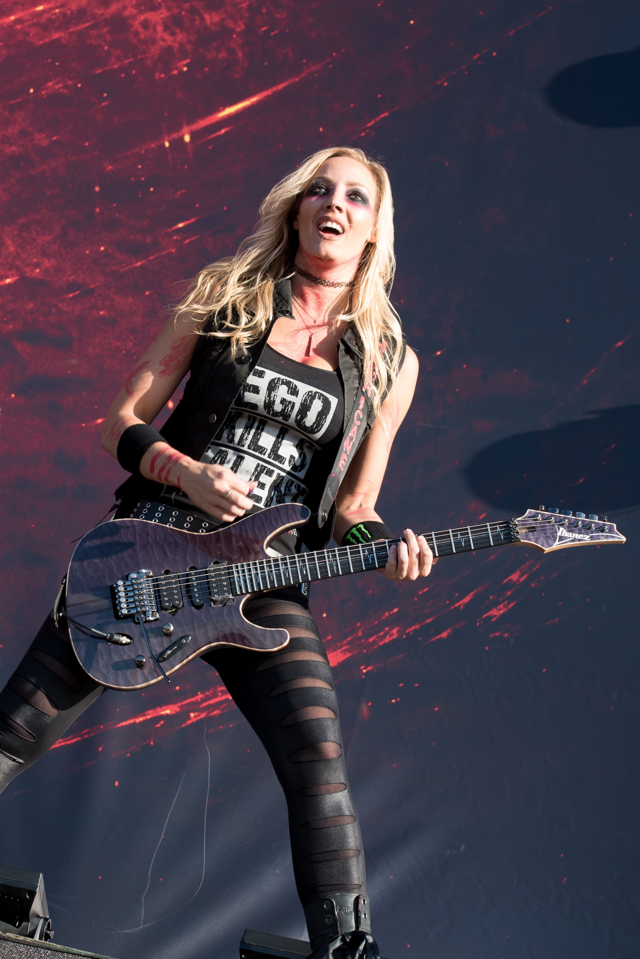 Nita Strauss beim Wacken Open Air 2017